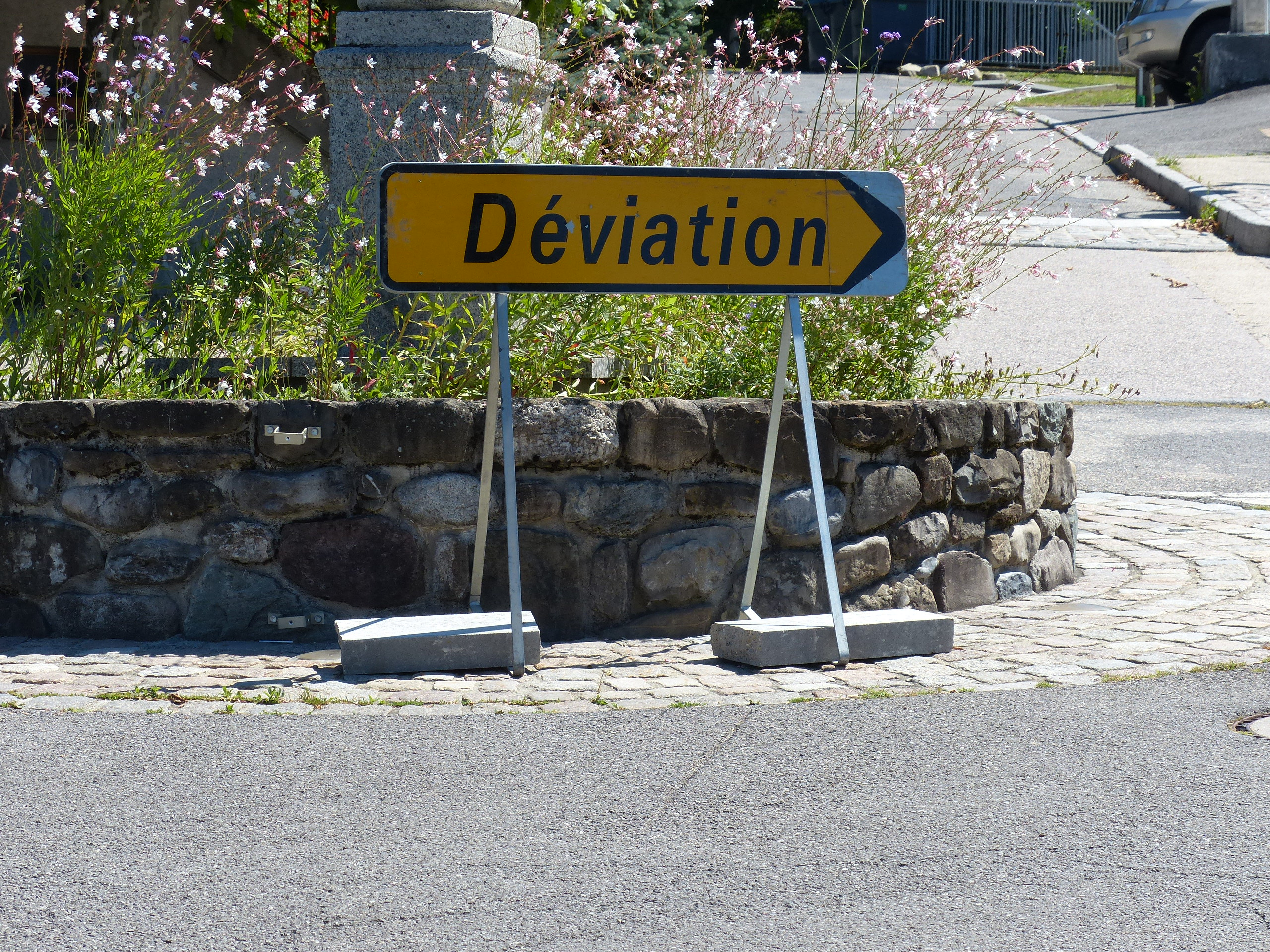 Panneau KD22a à Lucinges, France